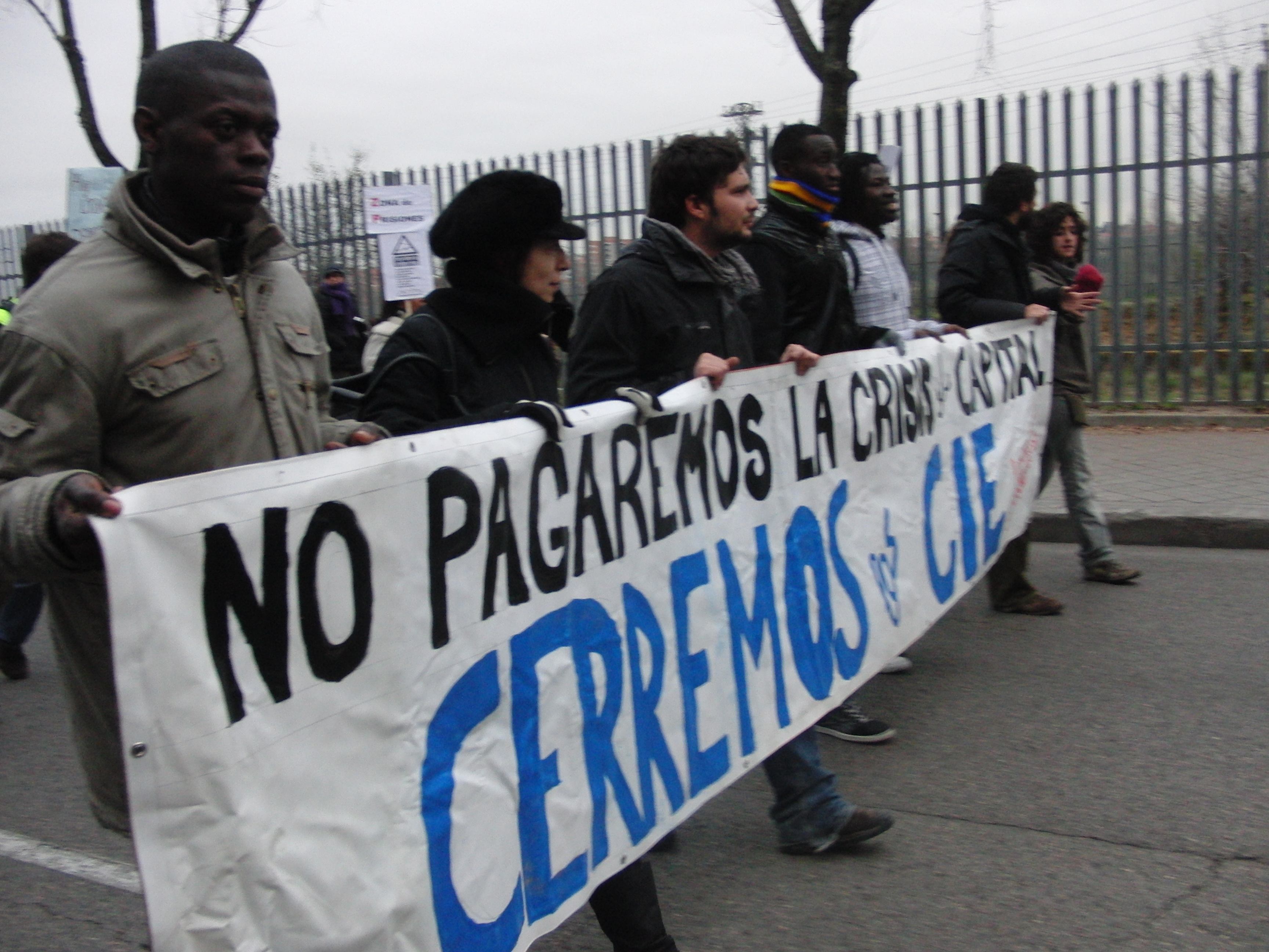 Manifestació contra els CIE, el 2010.